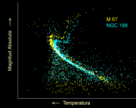 Comparación del diagrama HR de dos cúmulos abiertos: M67 más joven, y NGC 188 más antiguo.